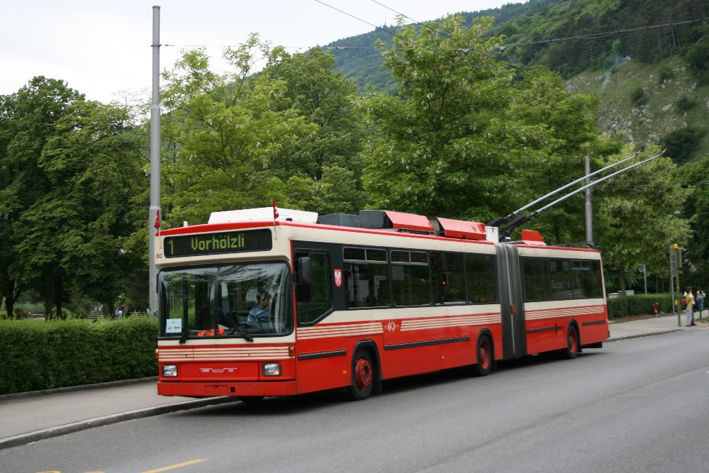 Der Swisstrolley 1 Nr. 80 der Verkehrsbetriebe Biel